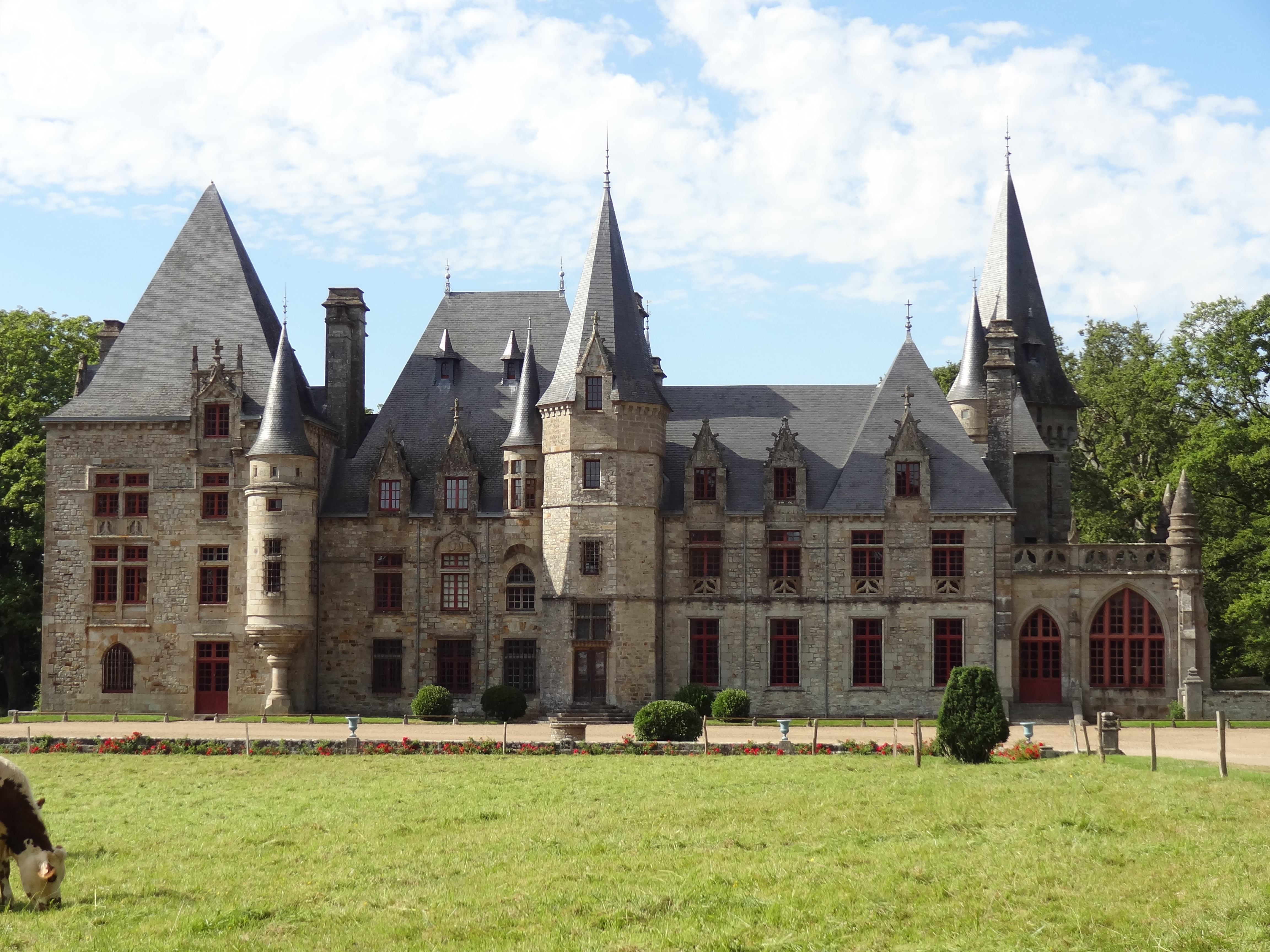 Chateau du Bois-Cornillé à Val-d'Izé en Ille-et-Vilaine .